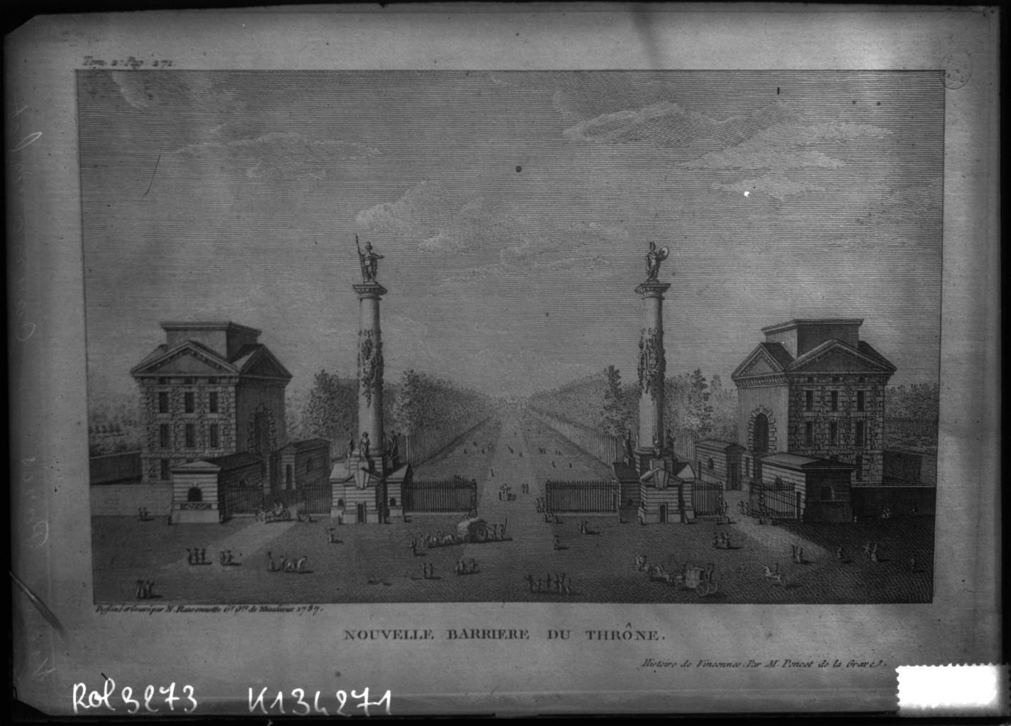 Vieux Paris au Musée Carnavalet [nouvelle Barrière du Thrône, gravure de 1787] : [photographie de presse] / [Agence Rol]